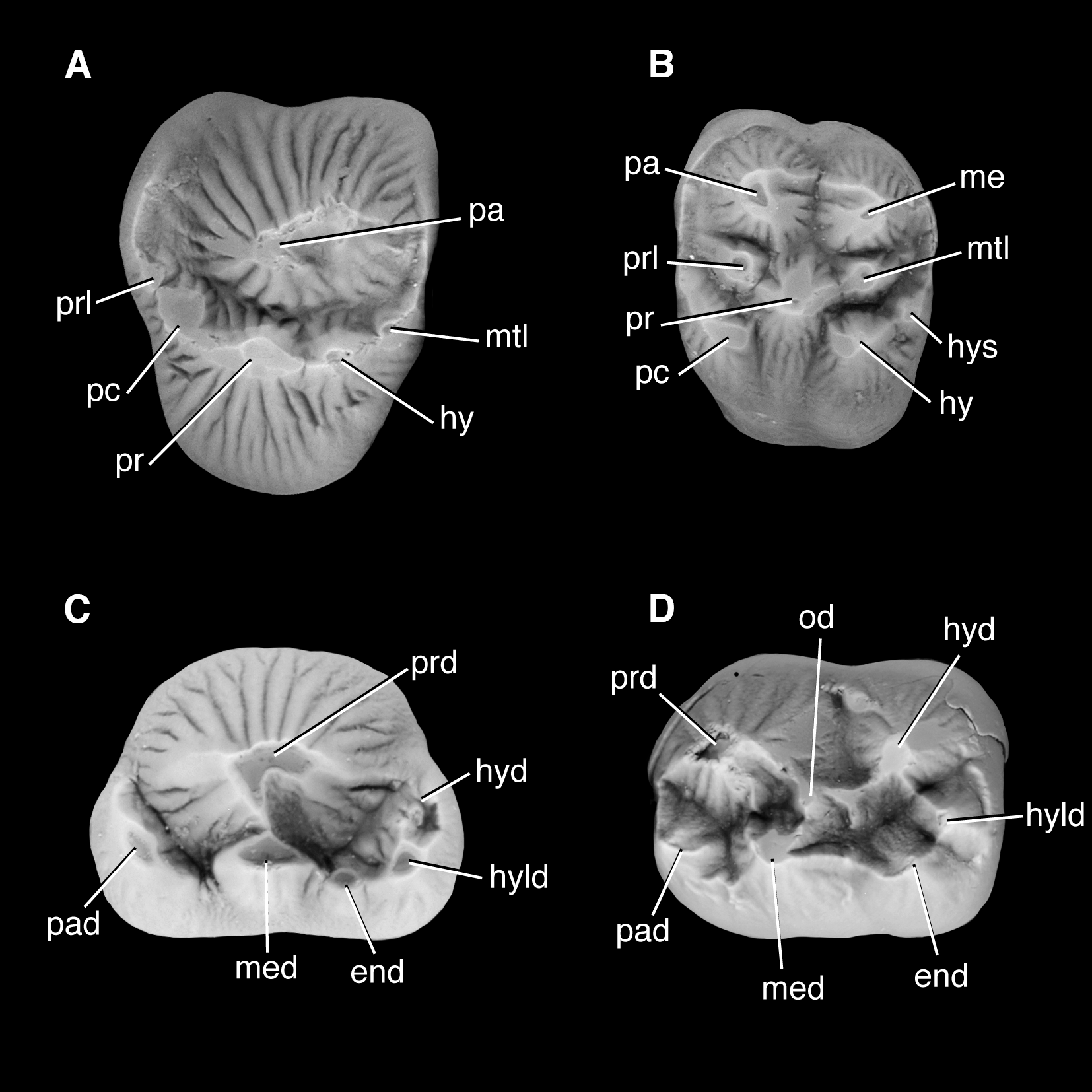 Tooth nomenclature for Periptychus carinidens. (A) upper premolar–P4 of NMMNH P-36631; (B) upper molar–M2 of NMMNH P-36631, (C) lower premolar—p4 of NMMNH P-36631; (D) lower molar—P4 of NMMNH P-19363. Abbreviations: end, entoconid; hy, hypocone; hyld, hypoconulid; hys, hypostyle; me, metacone; med, metaconid; mtl, metaconule; od, obliconid; pa, paracone; pad, paraconid; pc, pericone/protostyle; pr, protocone; prd, protoconid; prl, paraconule. Tooth images serve to identify cusps and are not to exact scale.